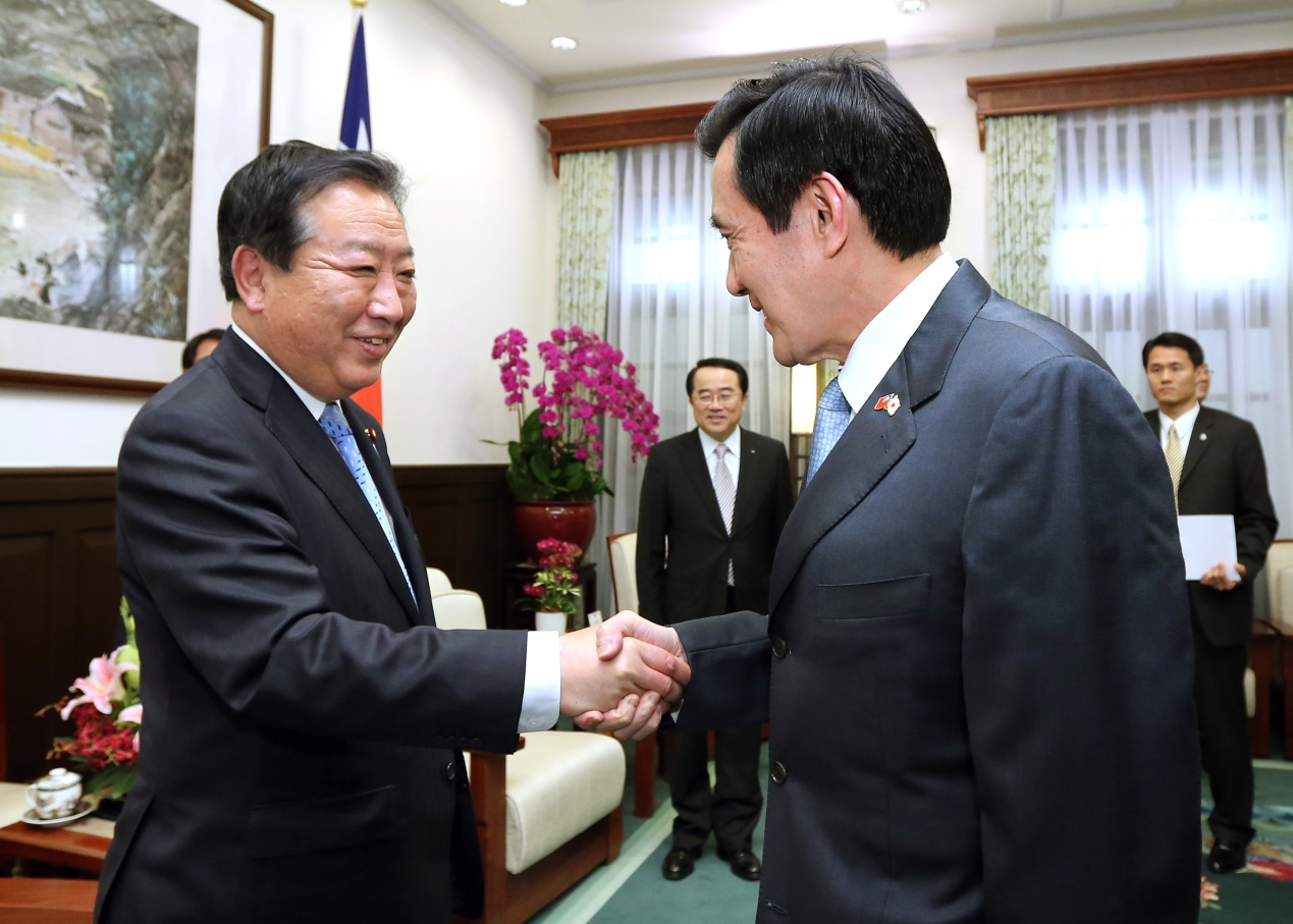 中文（台灣）: 亞東關係協會會長李嘉進（後排中）陪同中華民國總統馬英九（前排右）接見日本前首相野田佳彥（前排左）。